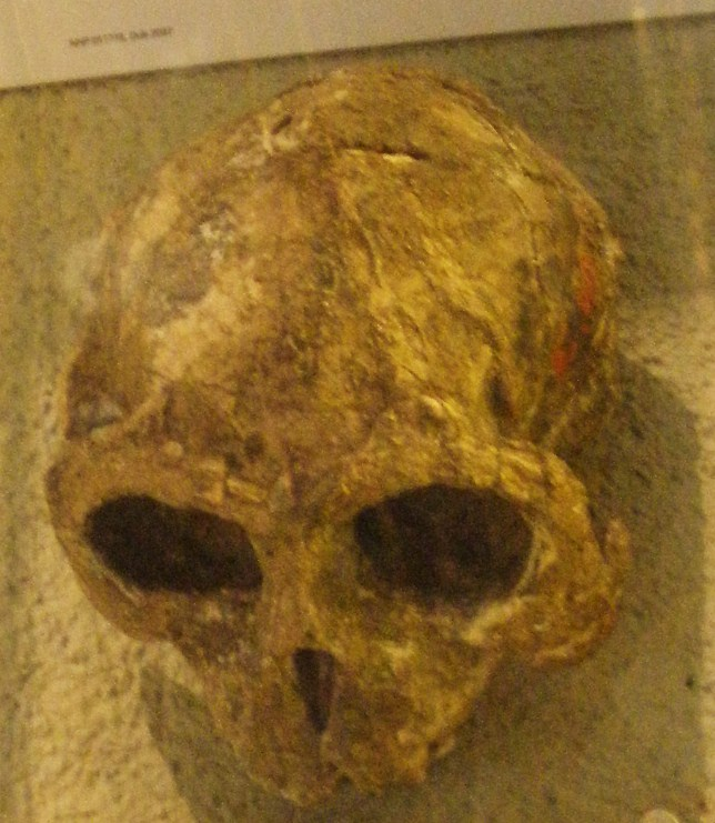 Fossil of Trachypithecus cristatus robustus, an extinct monkey- Took the photo at Naturalis museum, Leiden